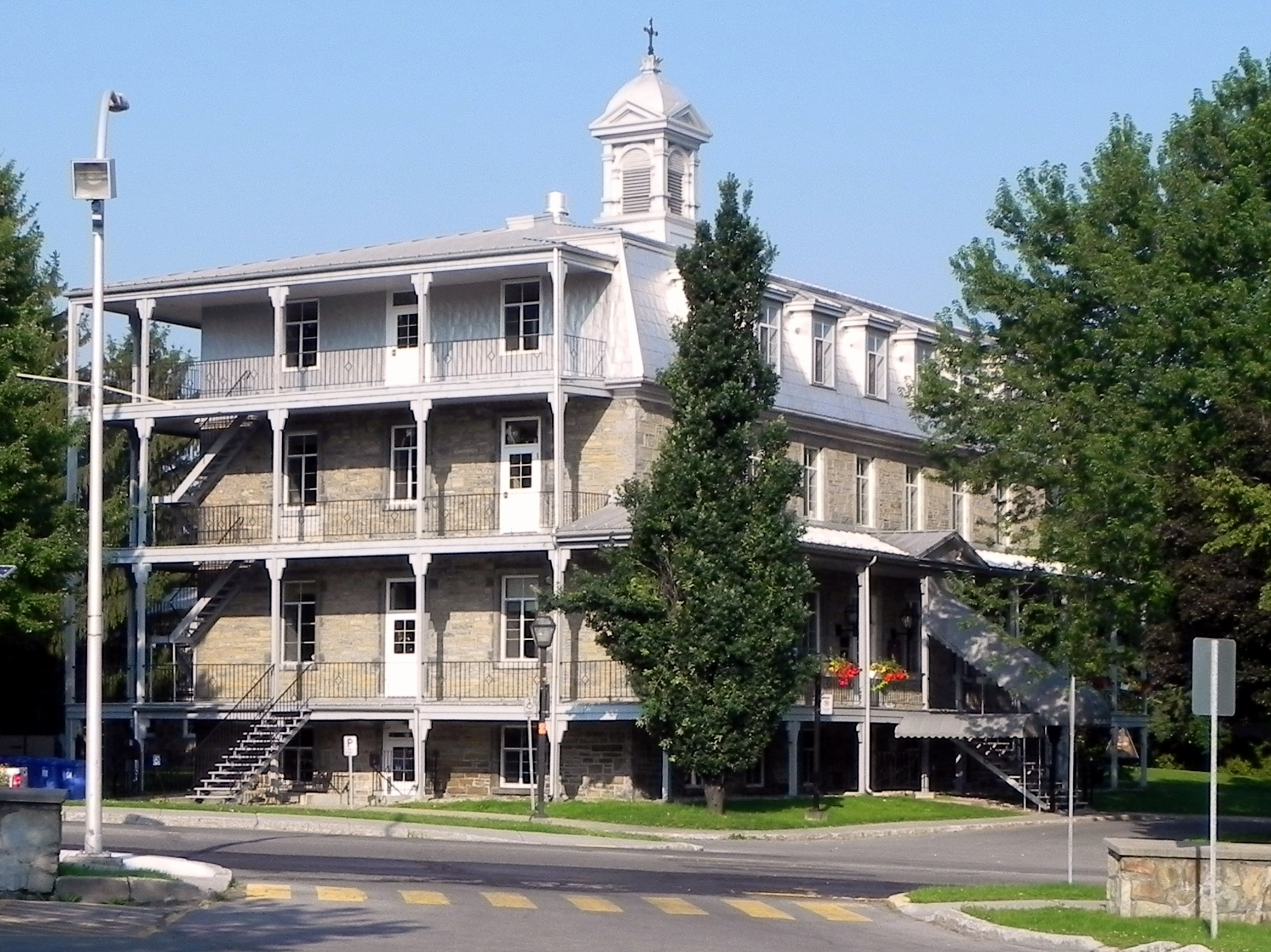 L'hôtel de ville de Châteauguay.